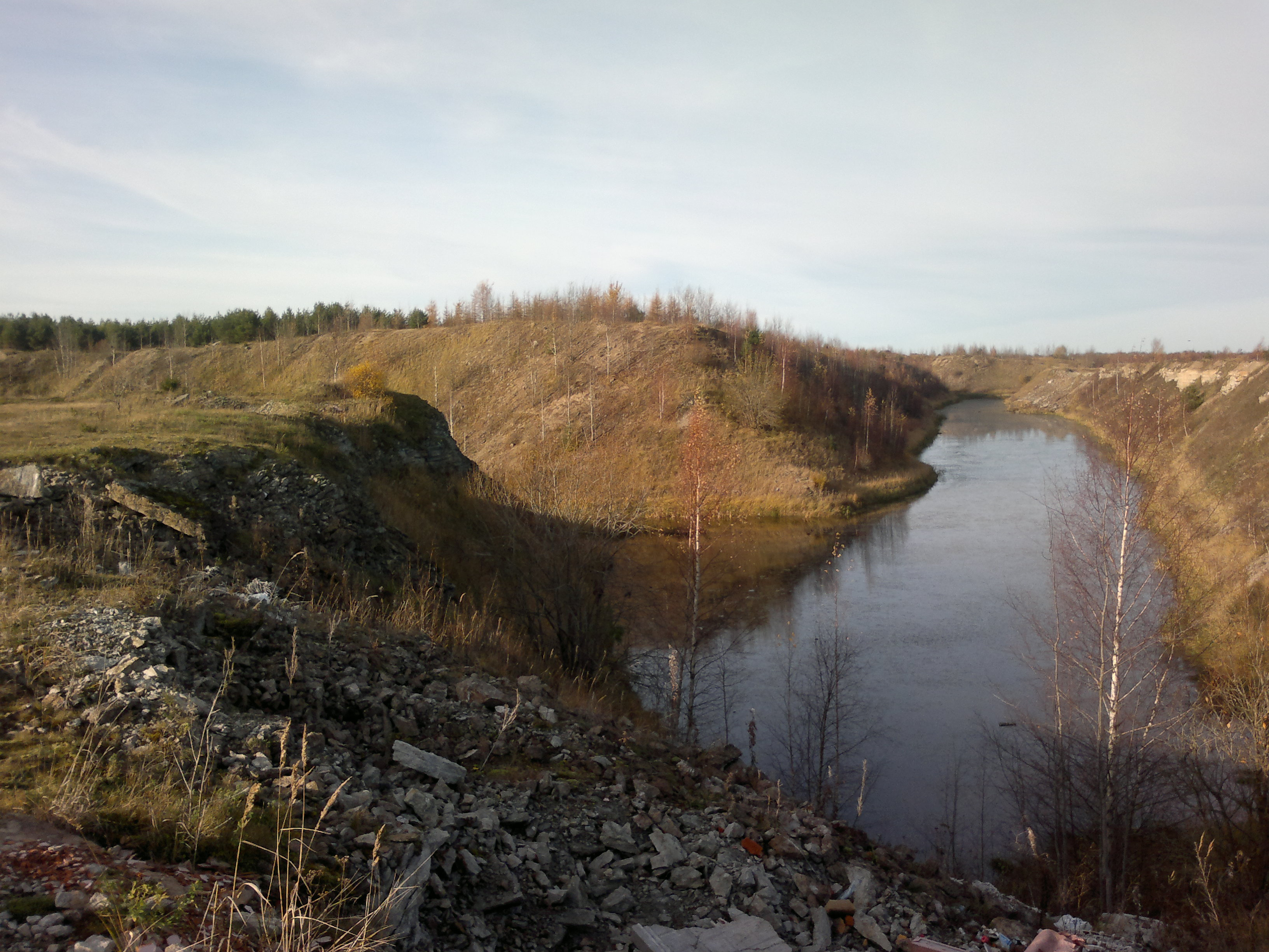 Maardu fosforiidikarjääri idaosa Rebala külas